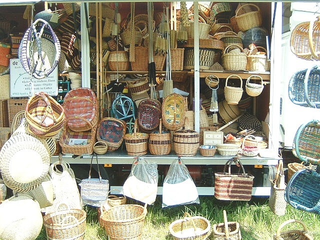 selbst erstellt am 22.4.05, Lizenz